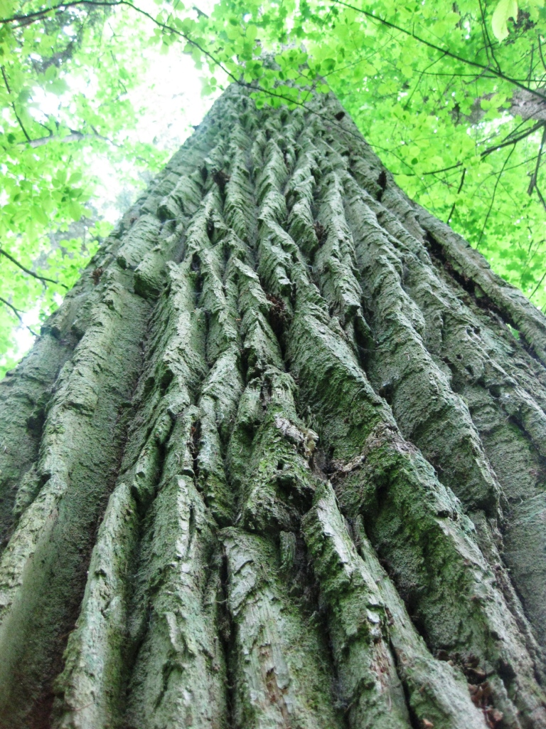 Բելովեժյան անտառի գիգանտ ծառերից